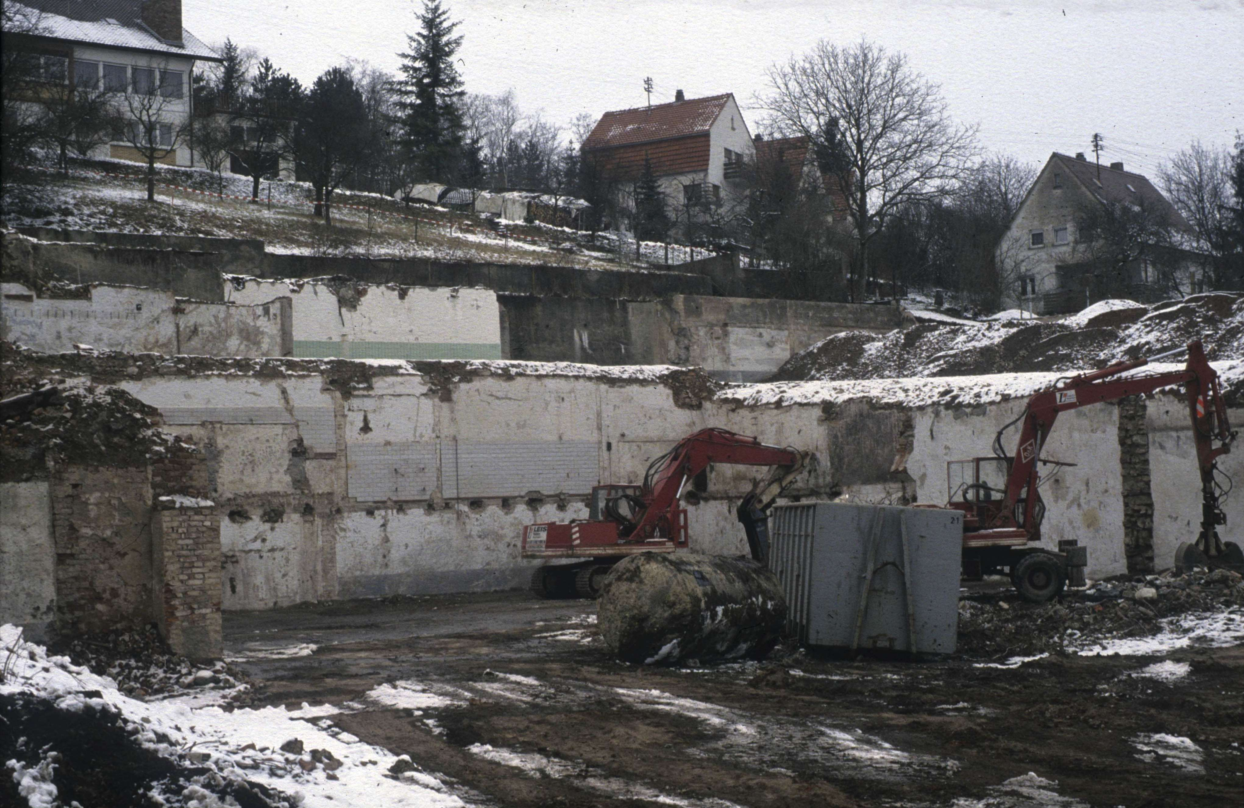 Abbruch der Brauerei Zipf in Tauberbischofsheim Landesarchiv Baden-Württemberg, Abt. Staatsarchiv Wertheim, K-LRA 91 Nr. 327 Permalink